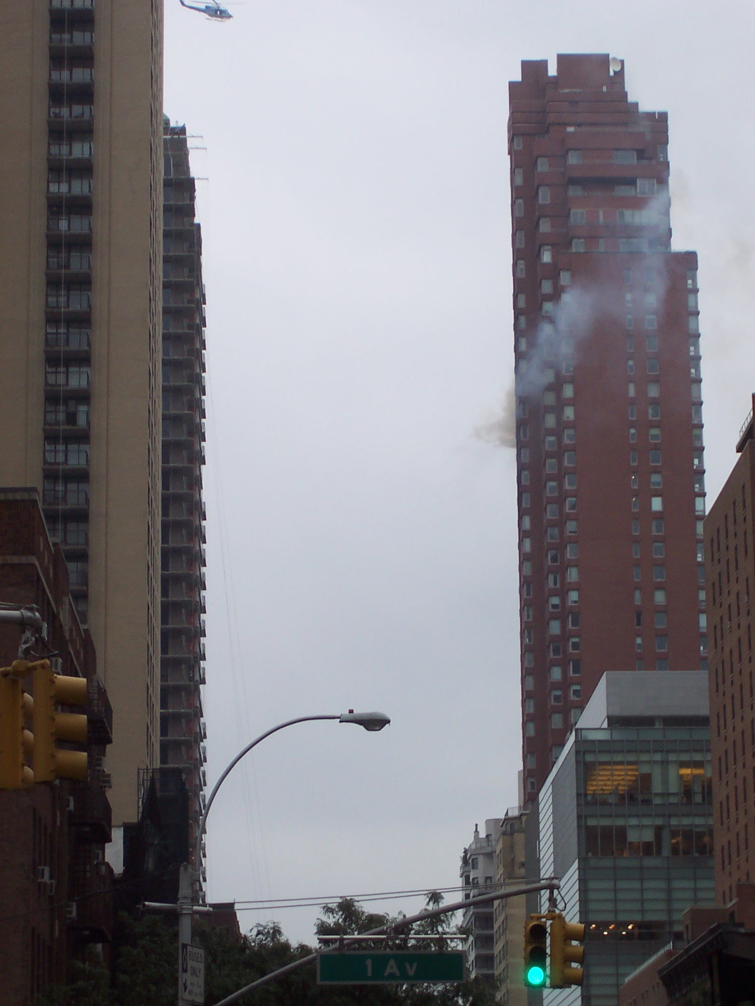 BelAire Condominium